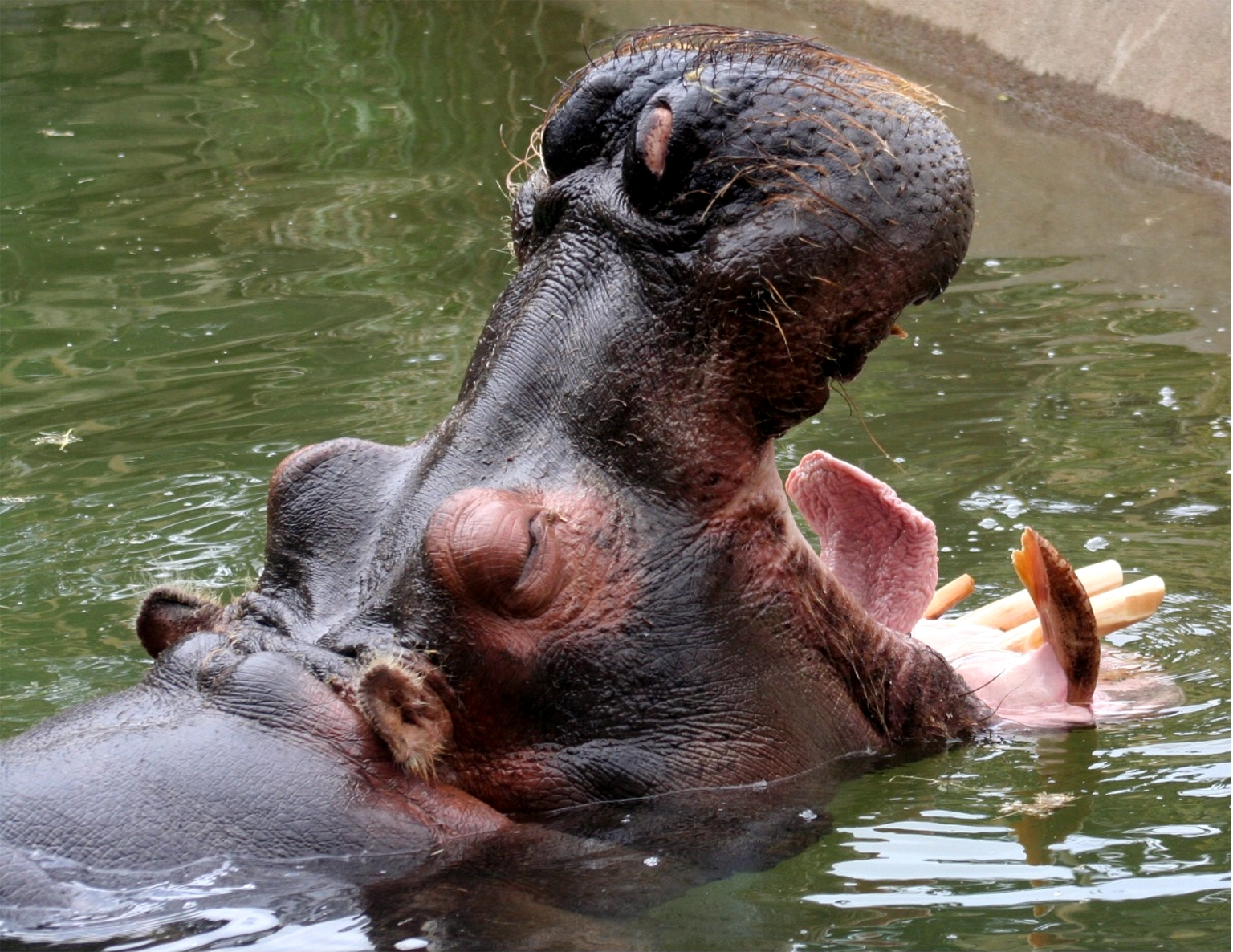 Hippopotamus,San Francisco Zoo,San Francisco.